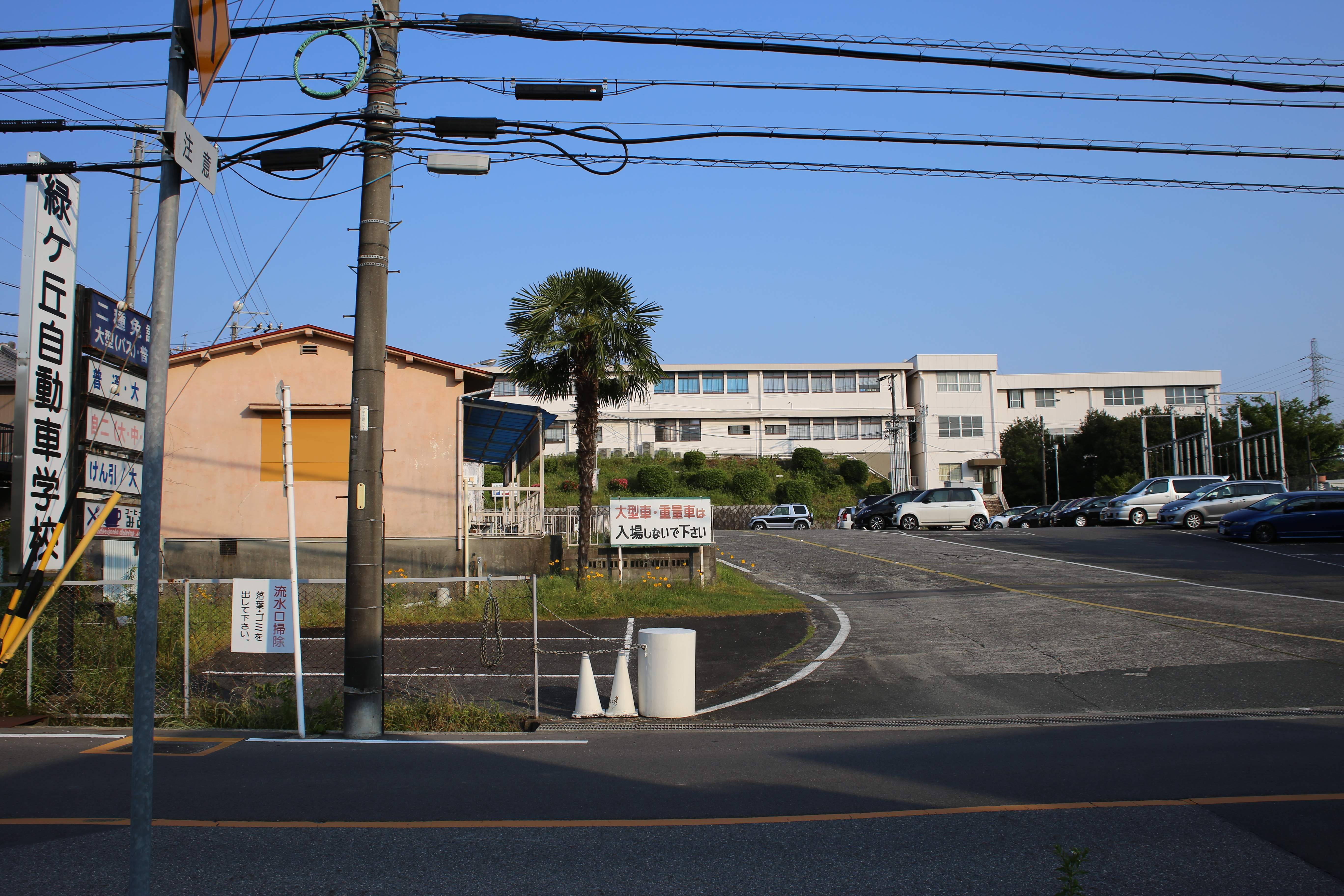 名古屋市緑区大高町殿山の緑ヶ丘自動車学校を北側公道より撮影